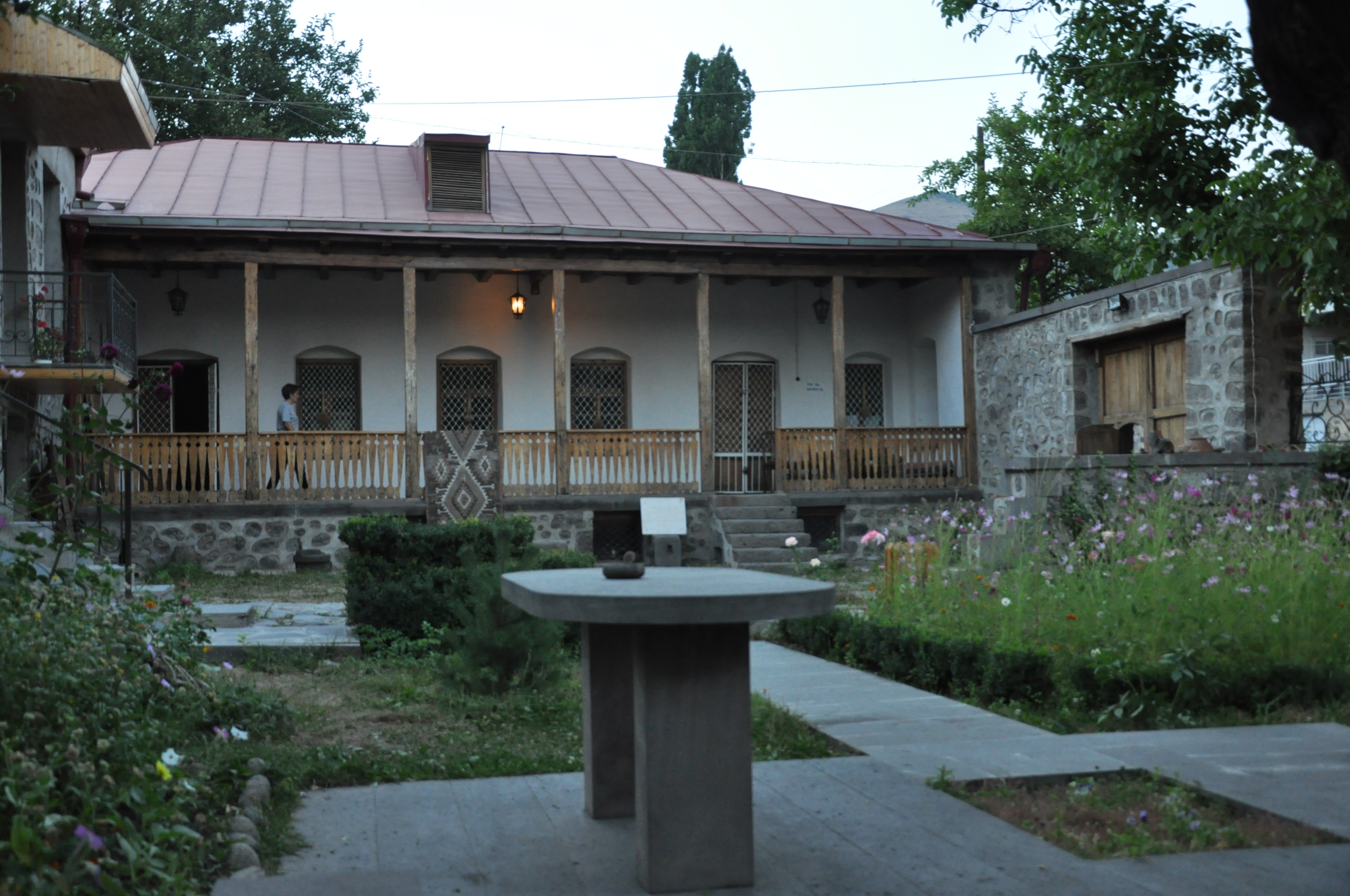 Ակսել Բակունցի տուն-թանգարան, Գորիս, Հայաստան: 3/156